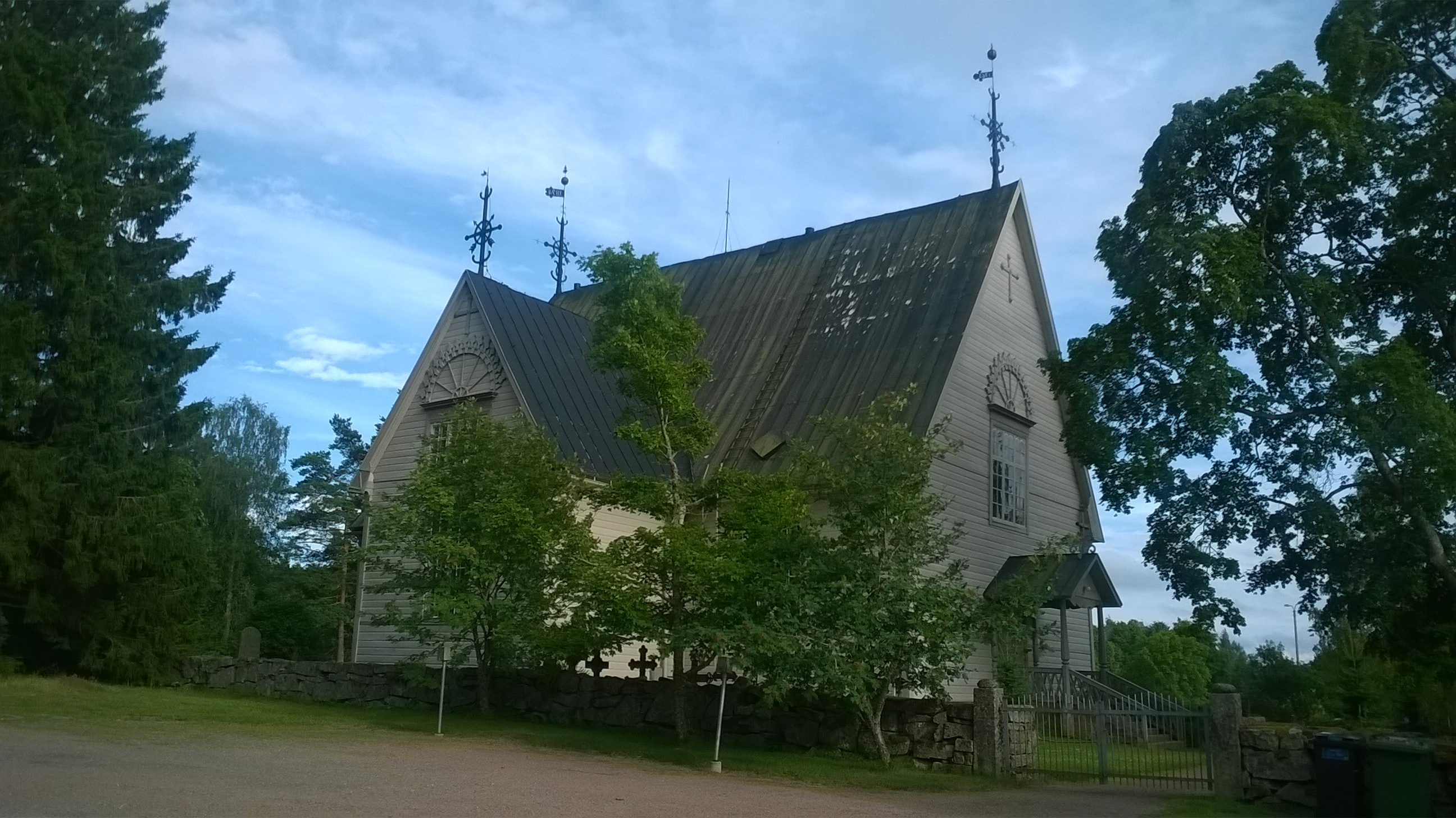 Lokalahden kirkko